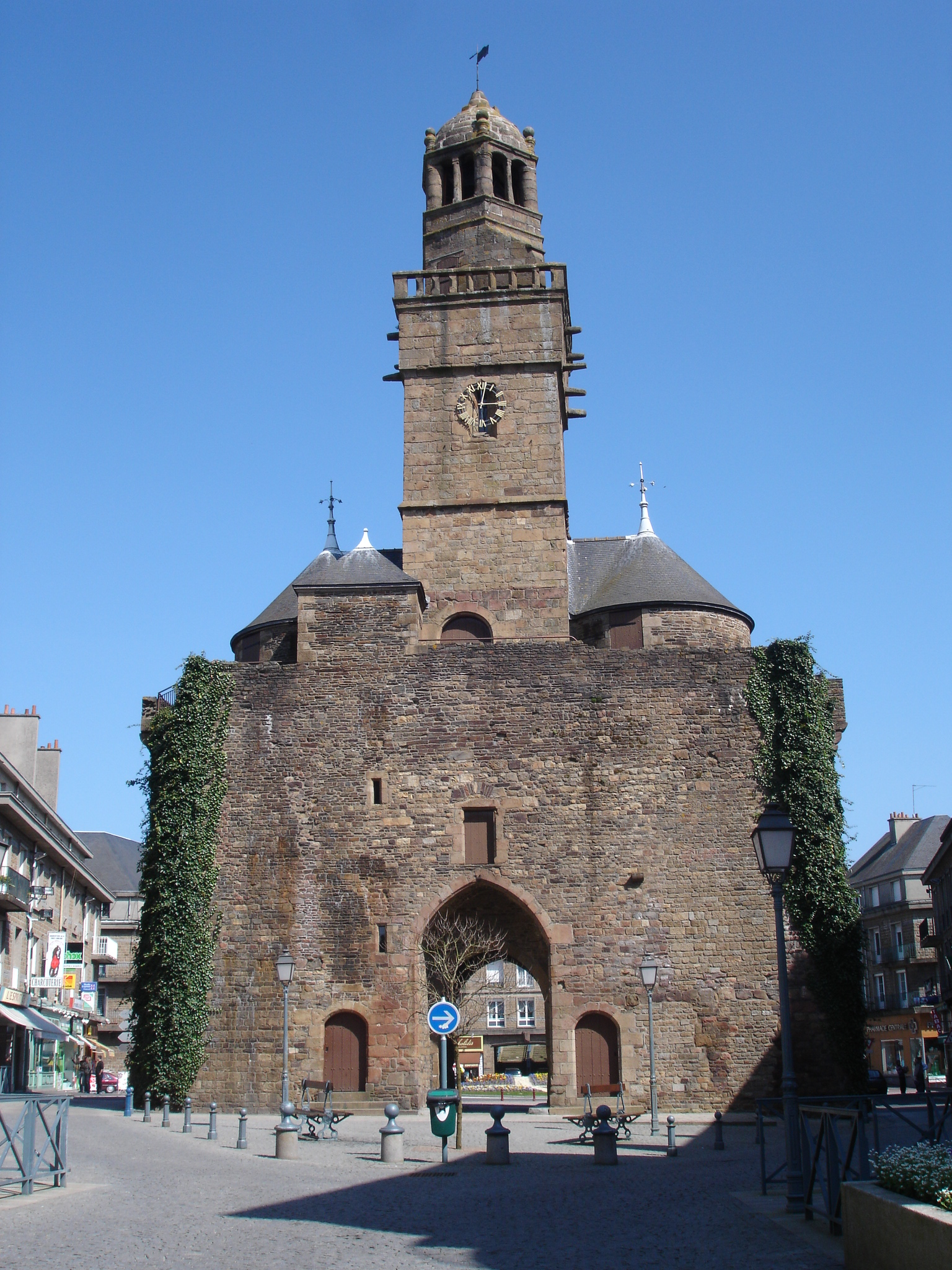 France, Calvados (14), Vire, Beffroi horloge